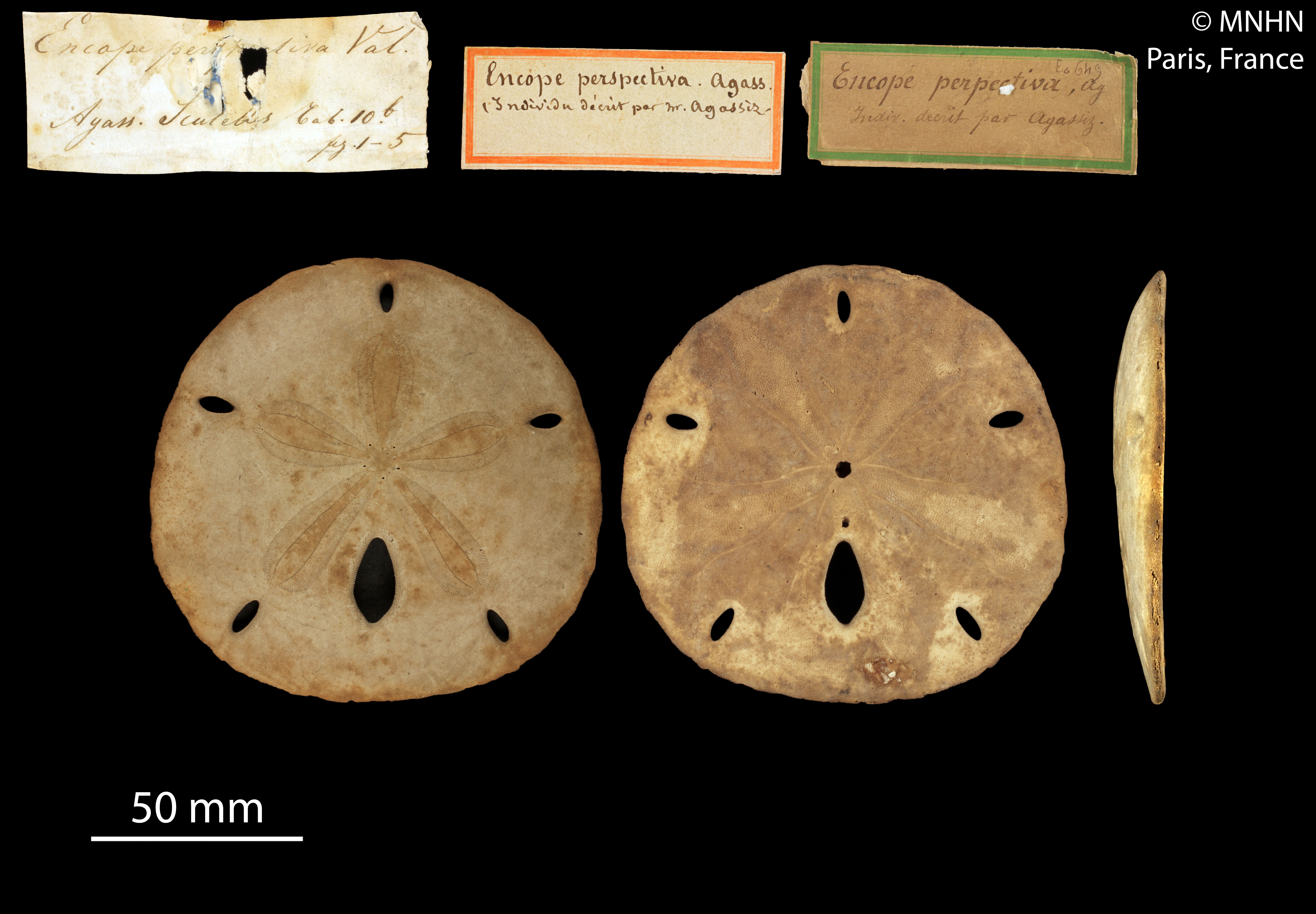 Encope perspectiva, collection du Muséum National d'Histoire Naturelle (Paris, France).